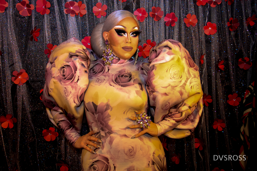 India Ferrah at RuPaul's DragCon LA 2018